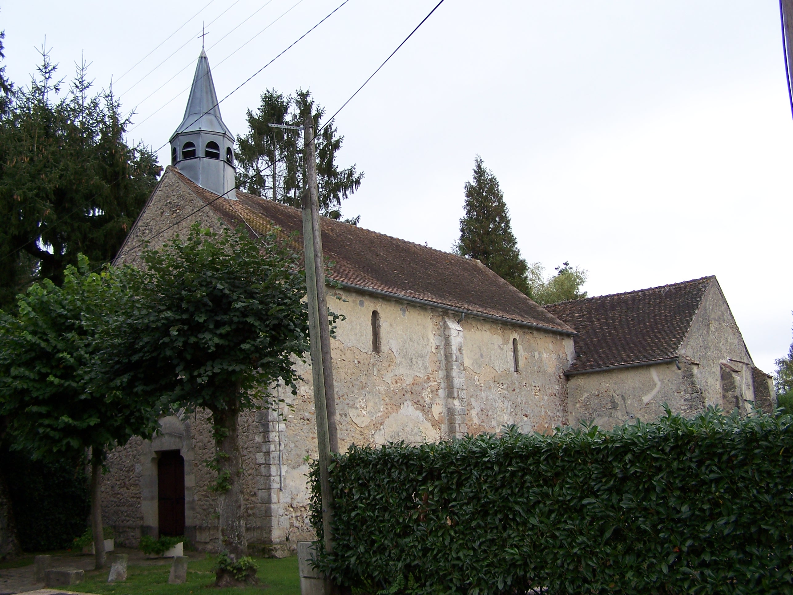 Chapelle Sainte-Anne, hameau de Moutiers à Bullion (Yvelines, France)